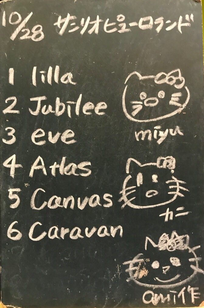 amiinAセトリボード(20181028(1))